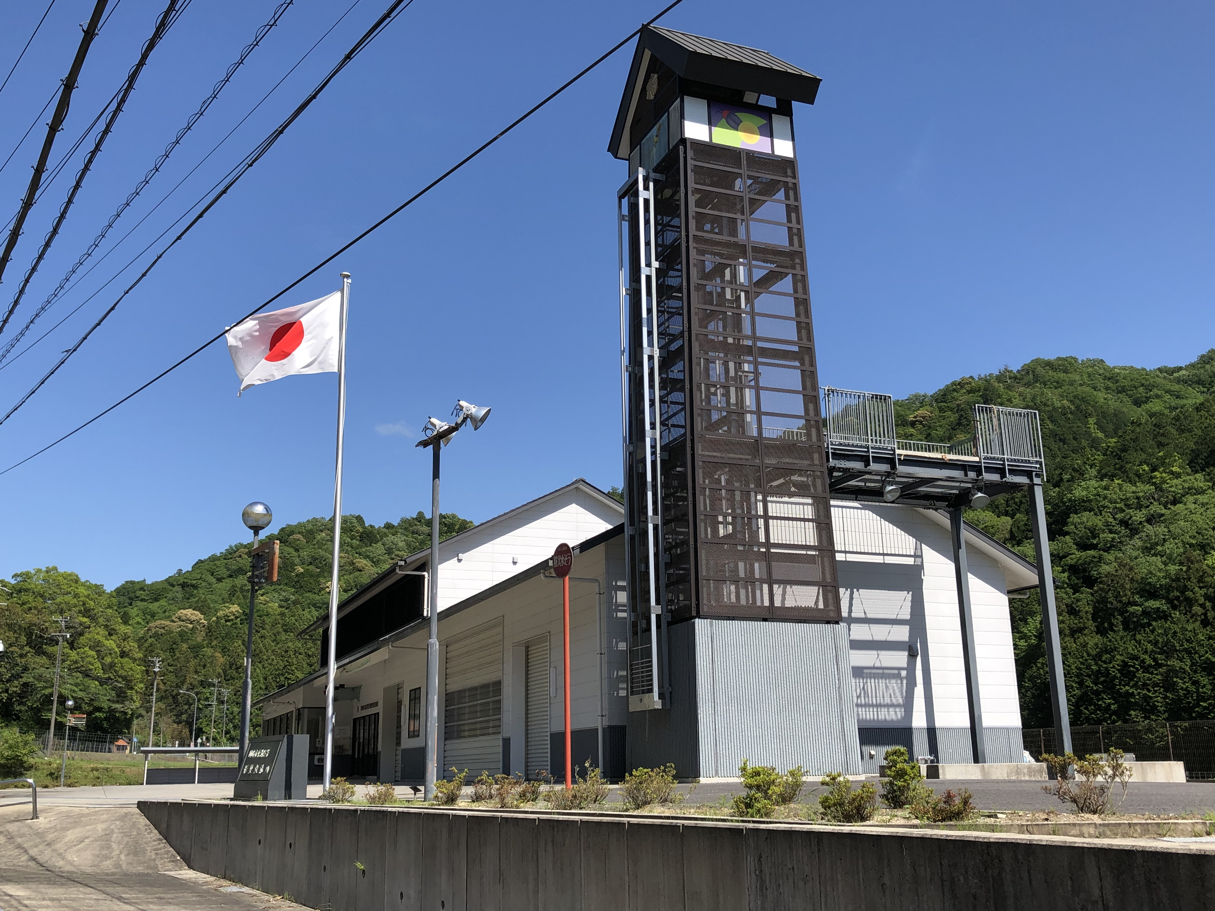 岡崎市消防本部 東消防署 形埜出張所